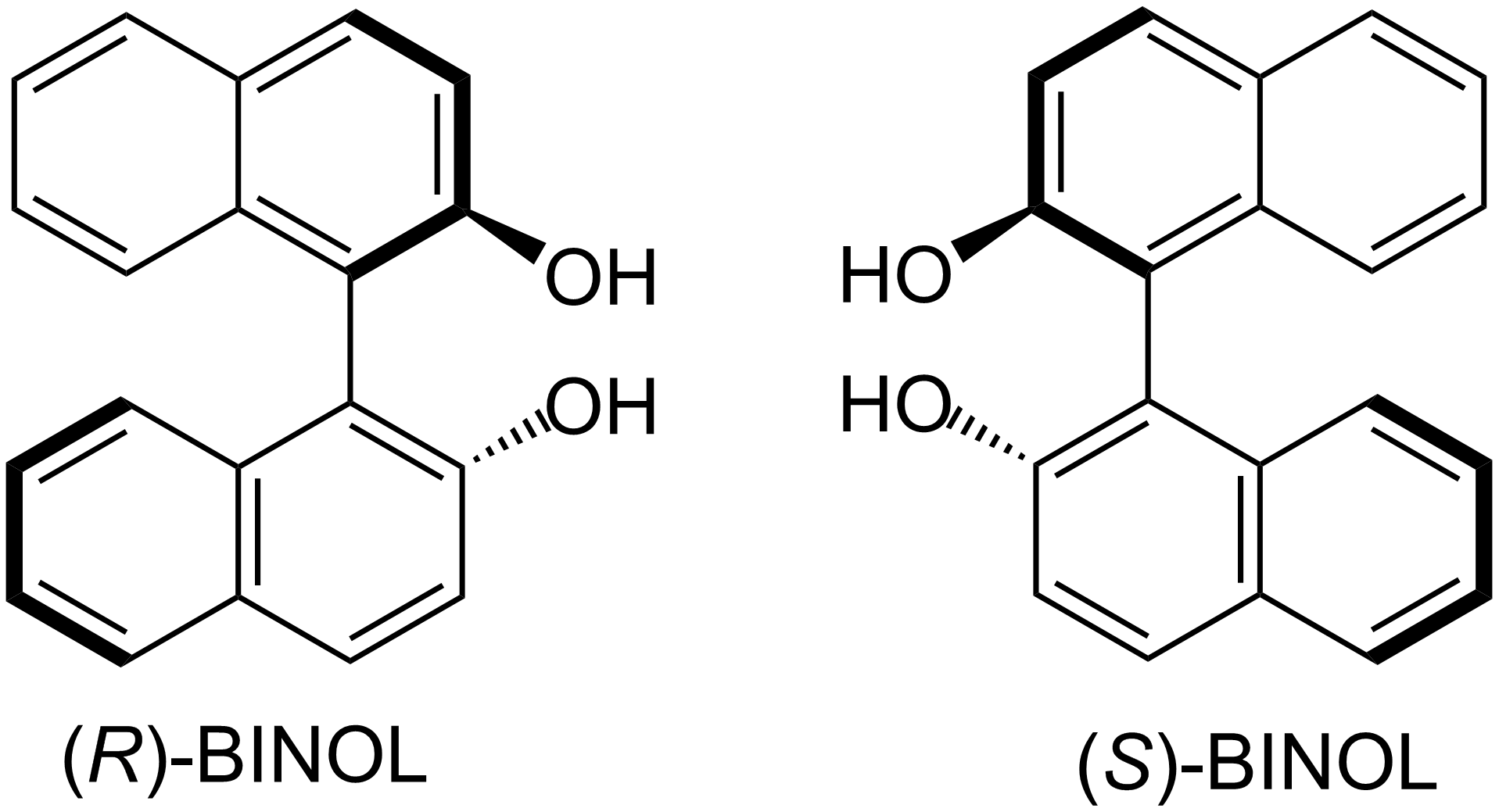 Strukturformeln von (R)- und (S)-BINOL